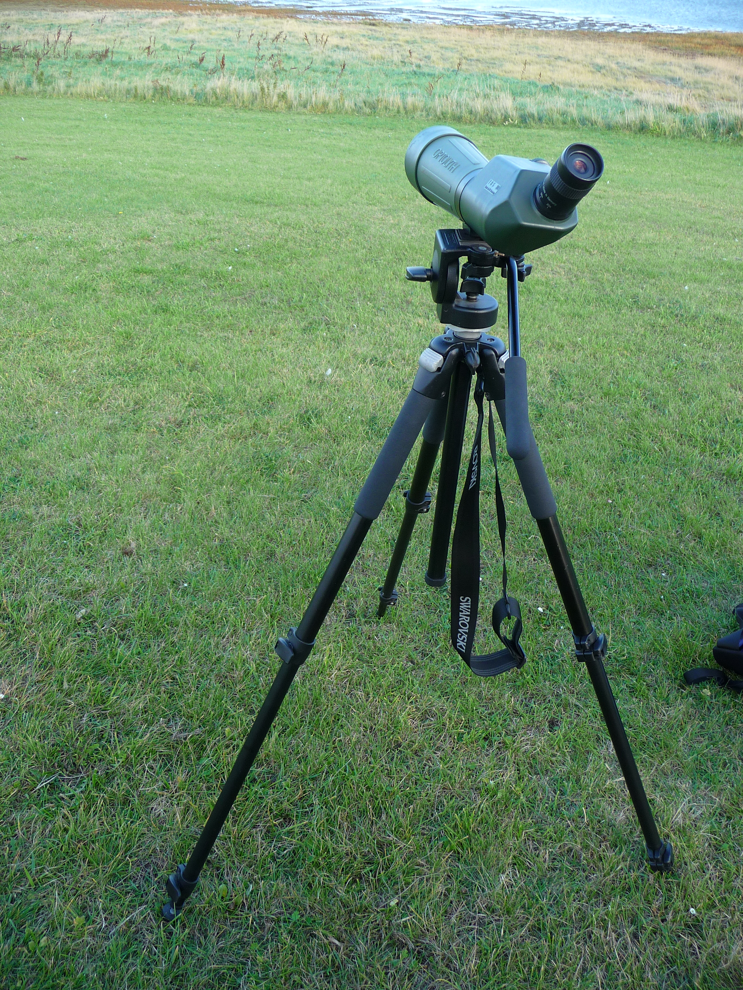 Aufgebautes Spektiv während einer vogelkundlichen Führung